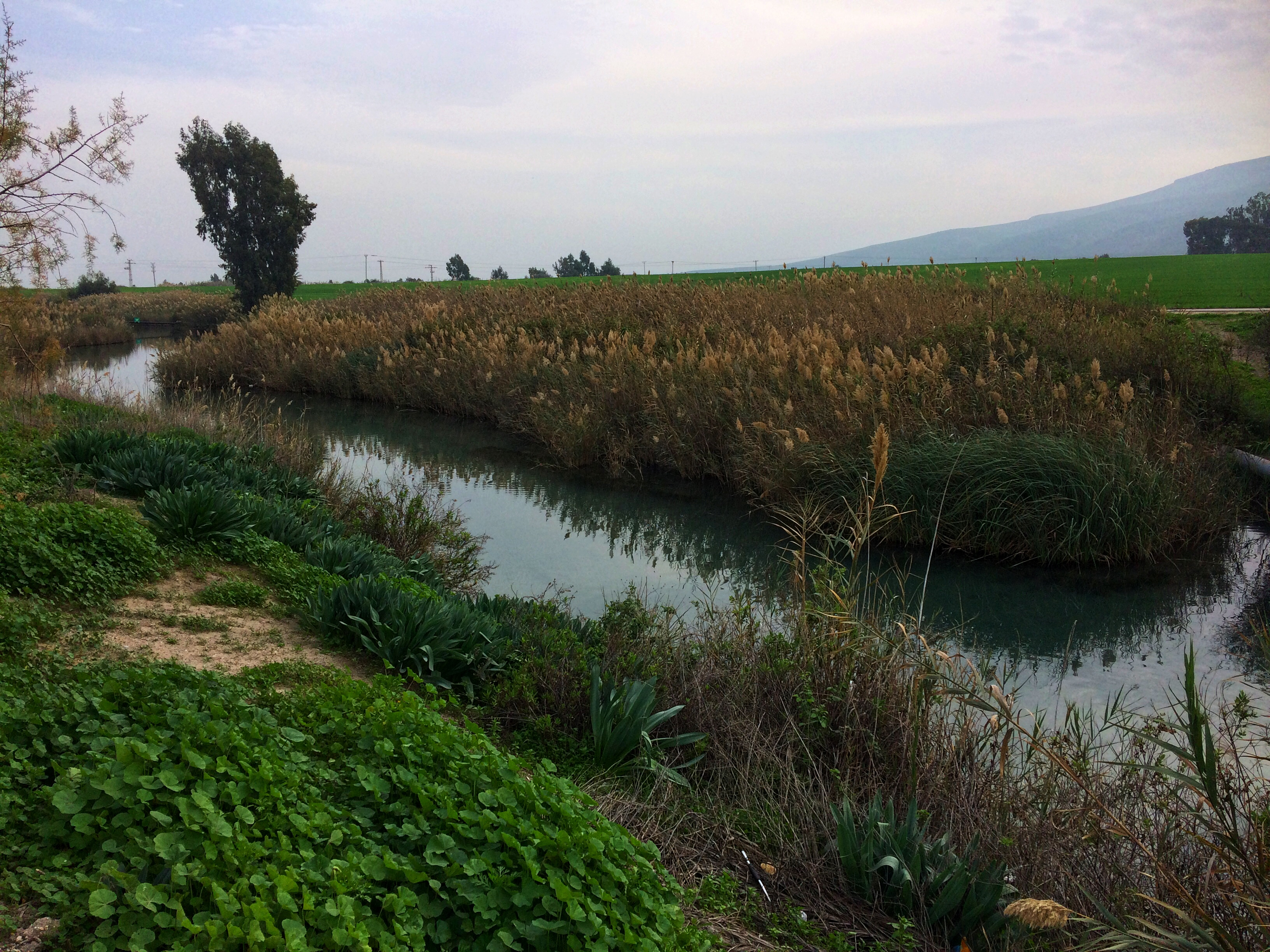 נחל הקיבוצים, עמק המעיינות, ישראל